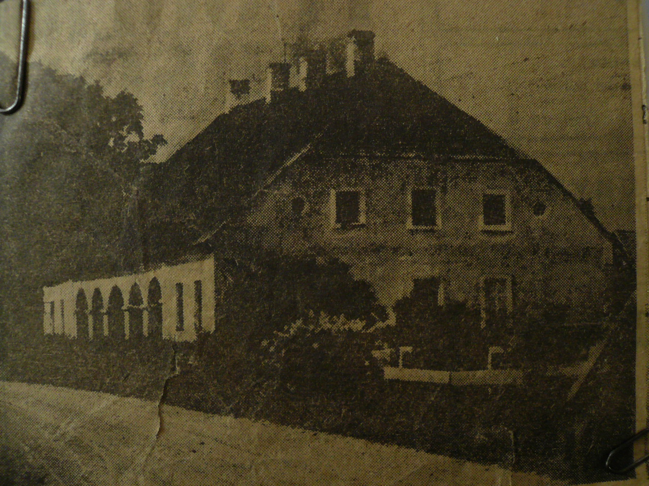 Ninasi postijaam. Foto ajalehest